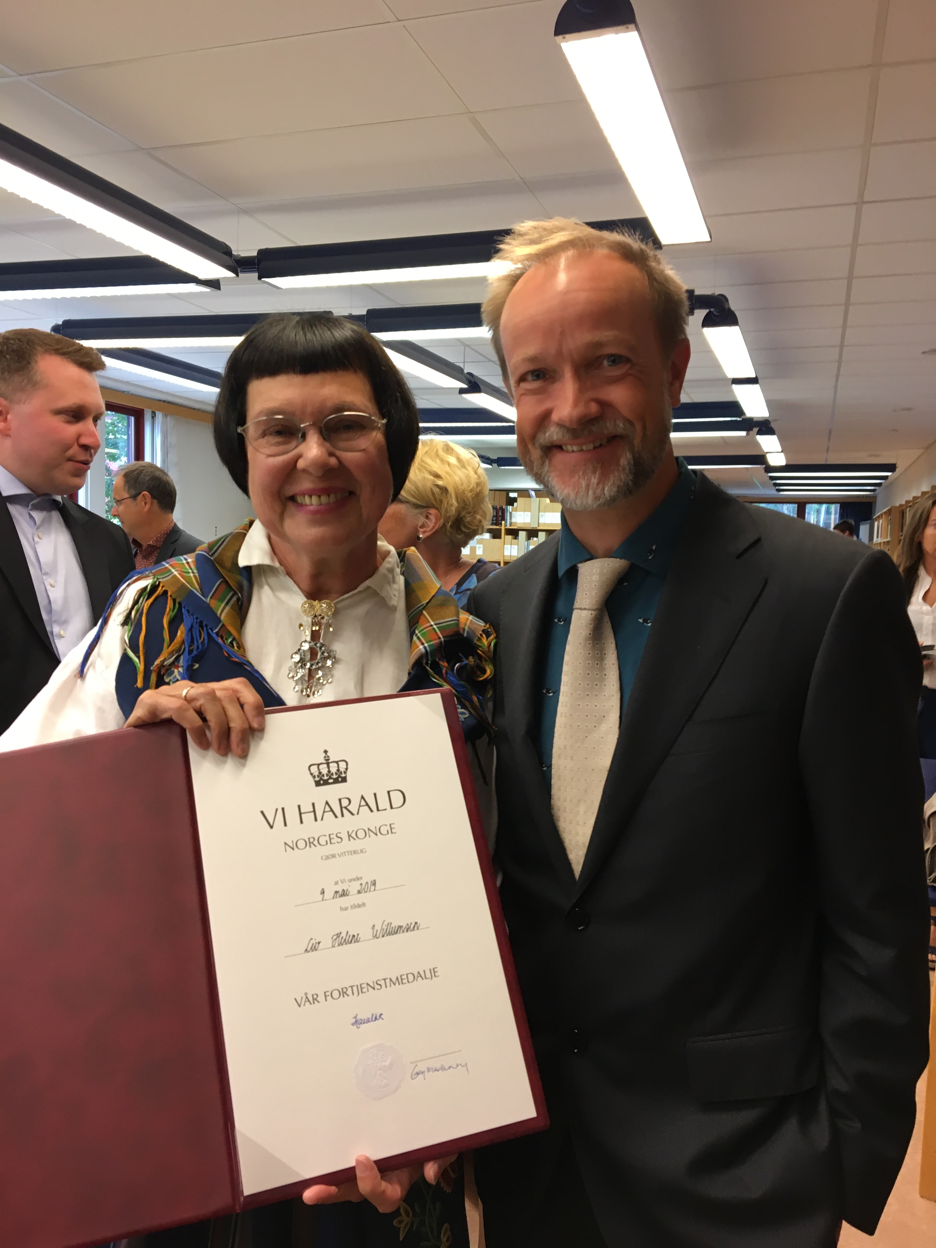 Liv Helene Willumsen under mottakelsen av kongens fortjenestemedalje i 2019. Til høyre instituttleder ved AHR John Mcnicol